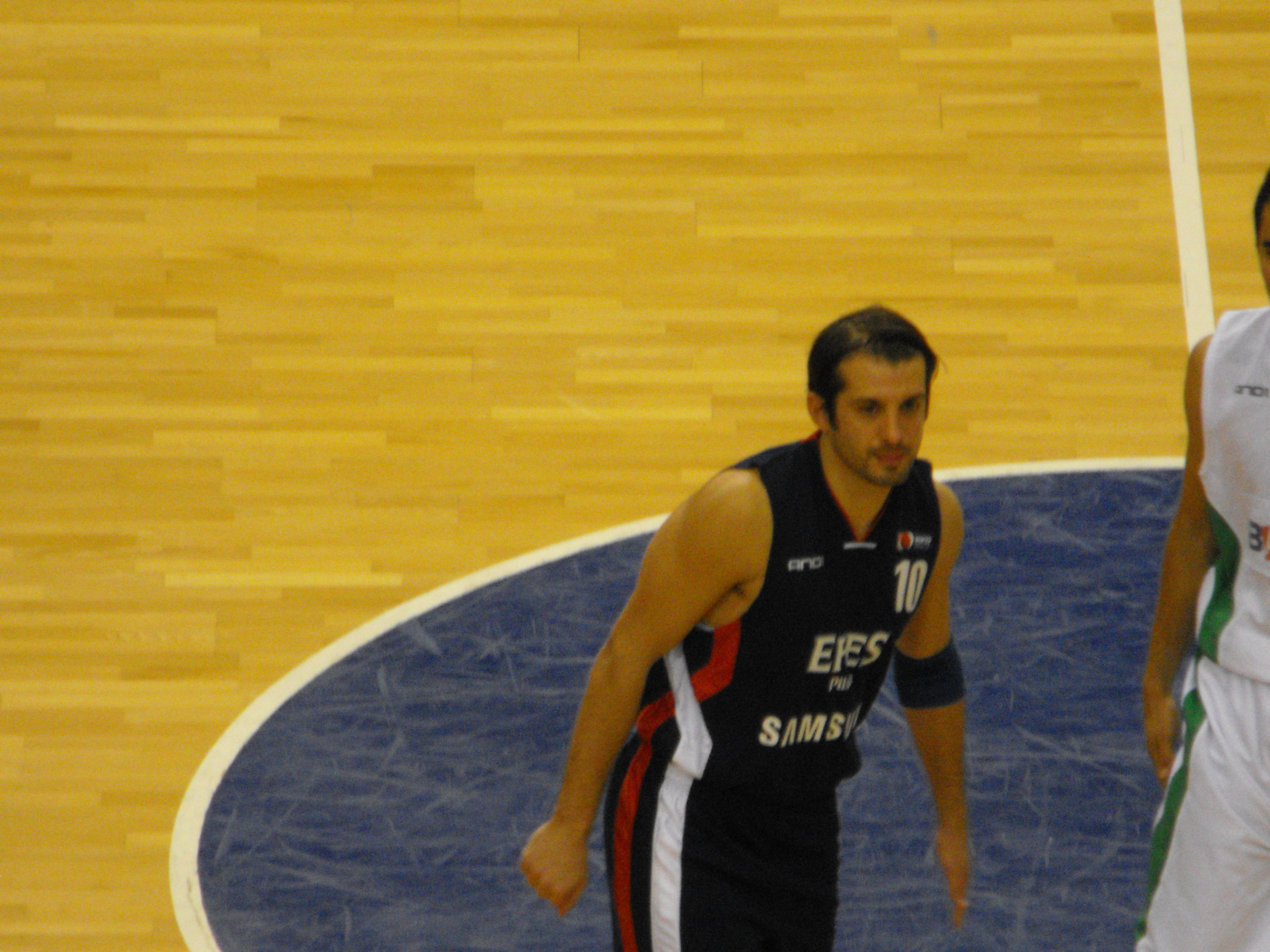 Bornova Belediye-Efes Pilsen maçı, Kerem Tunçeri